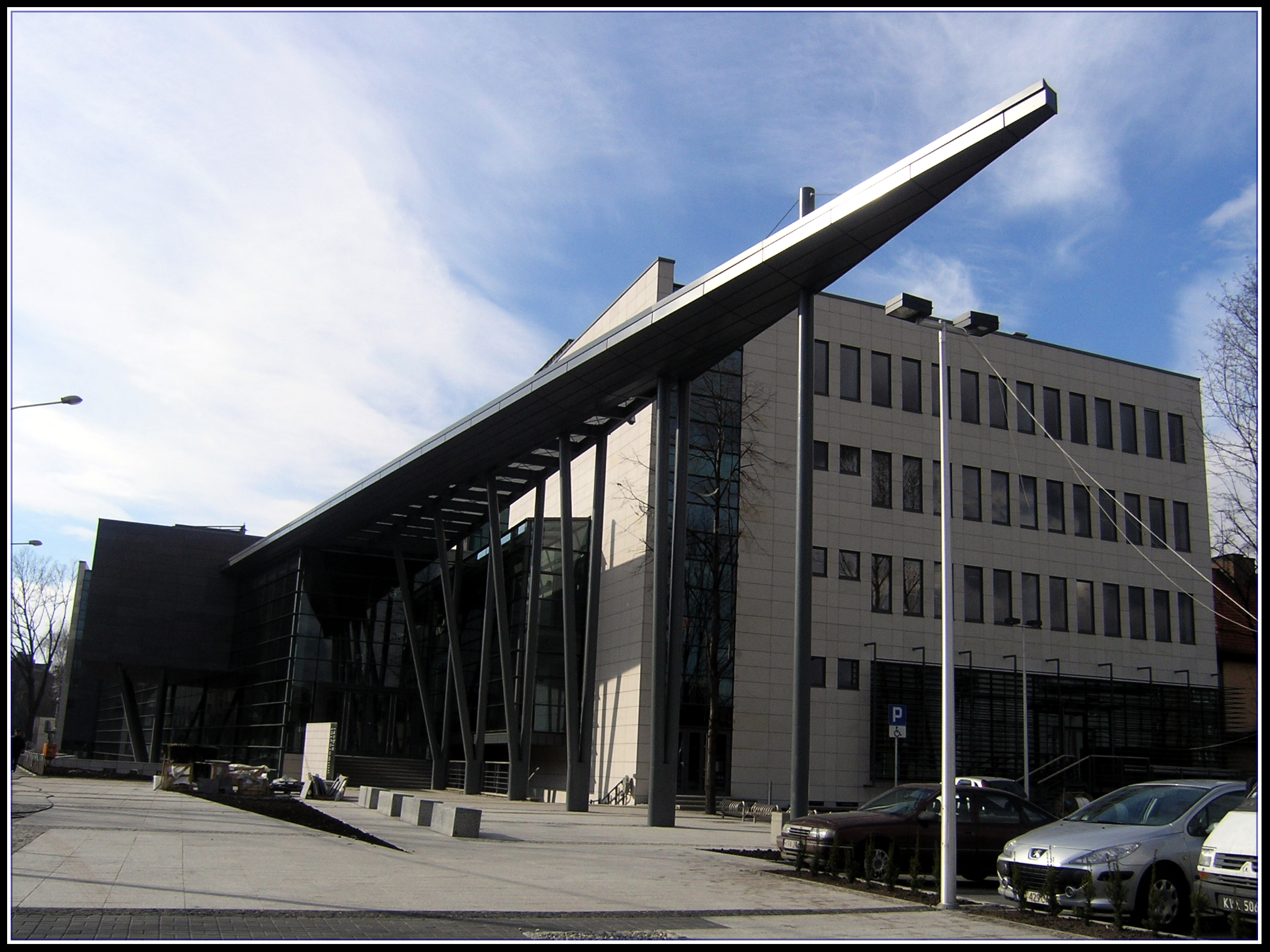 Budynek Uniwersytetu Śląskiego wydział filologii w Sosnowcu